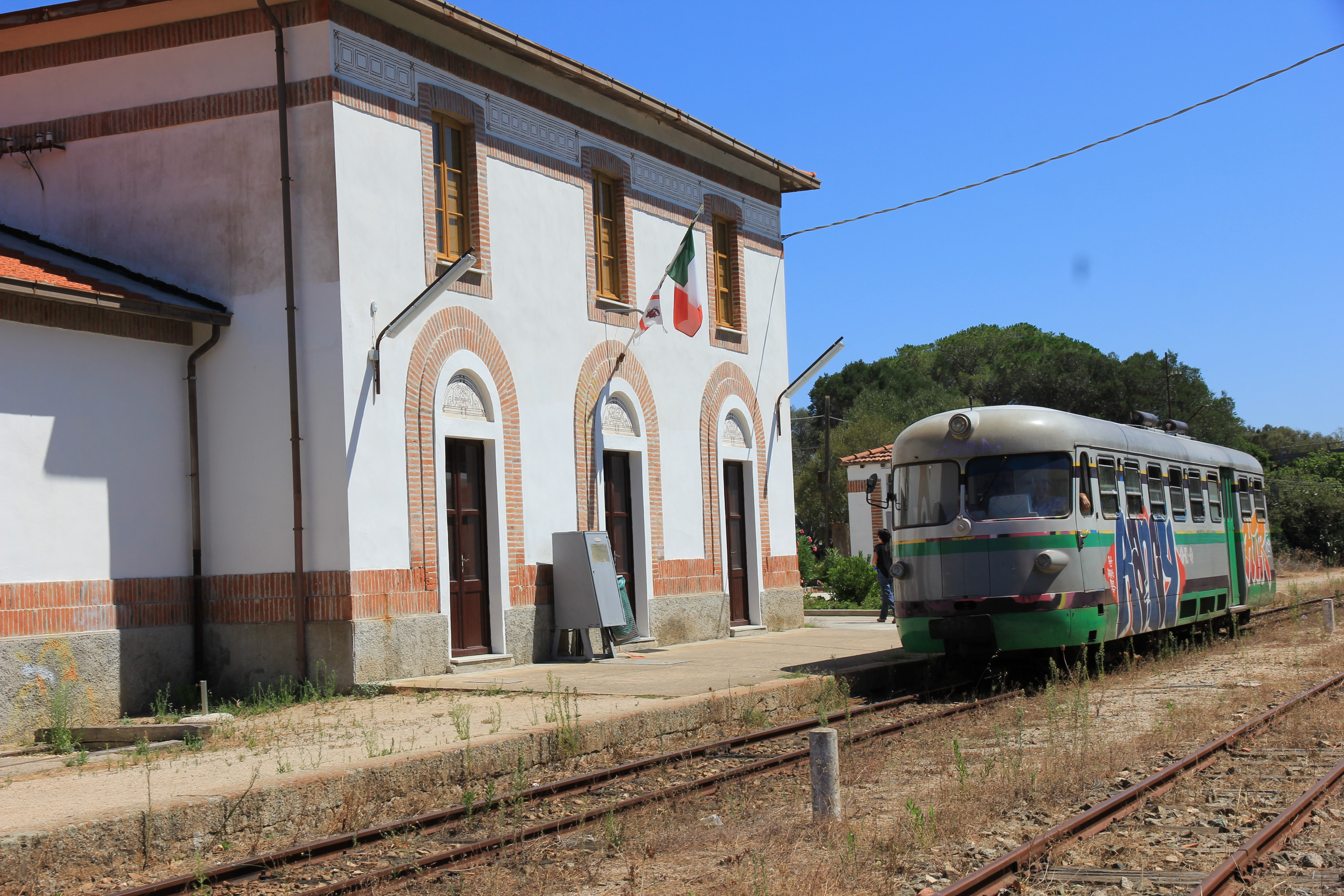 Arzachena, stazione ferroviaria